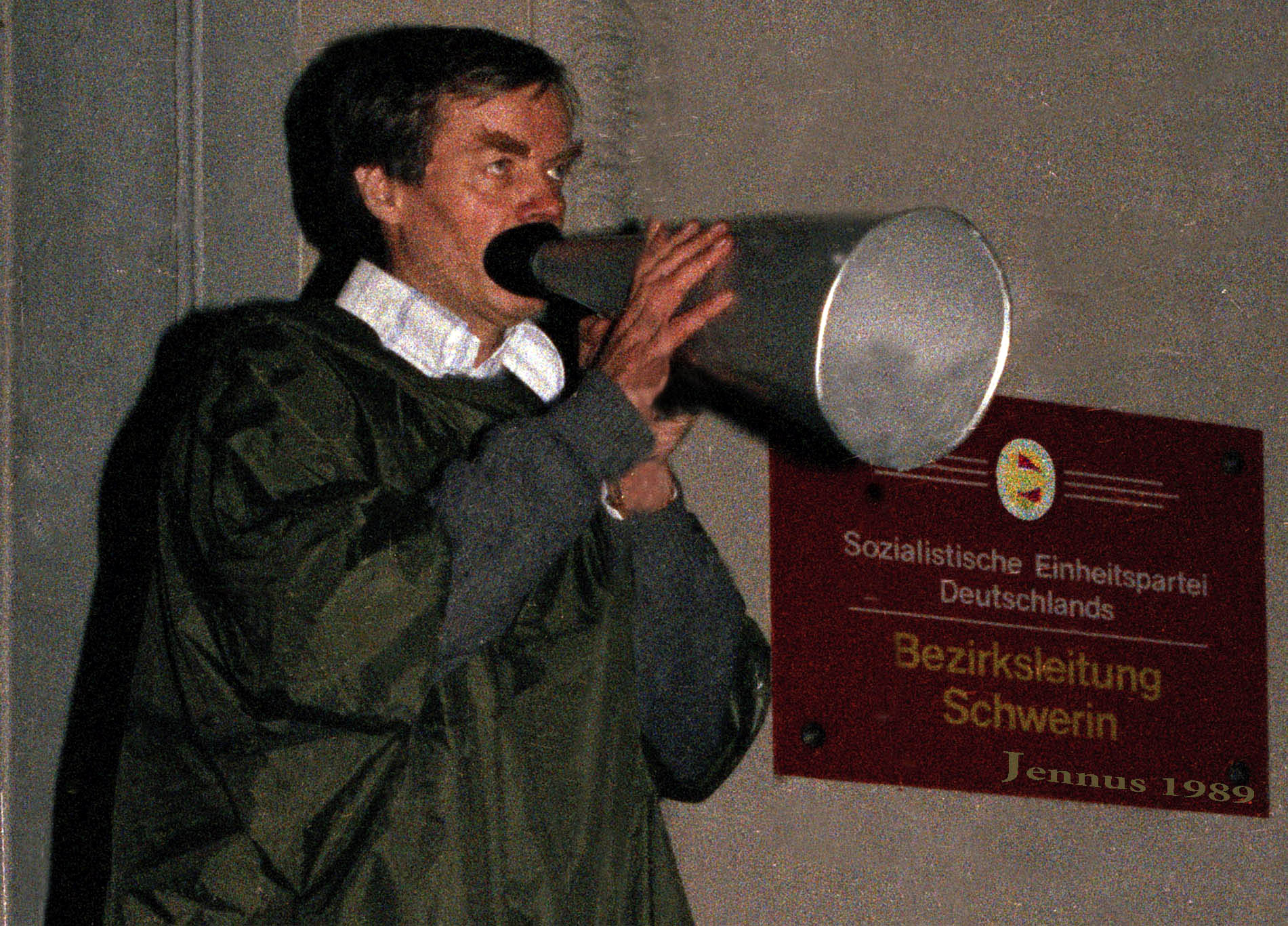 Heiko Lietz im Oktober 1989 vor der SED-Bezirksleitung in Schwerin.